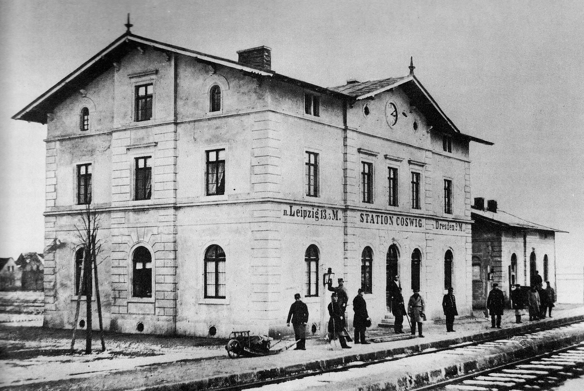 Bahnhof Coswig Dresden, 1860. Ansicht des Empfangsgebäudes von der Bahnseite.